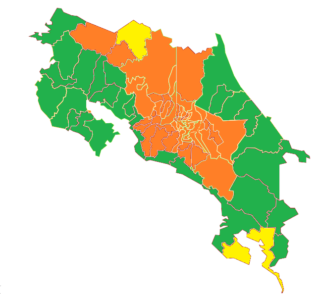 resultado de las elecciones presidenciales de CR por cantón en 2014